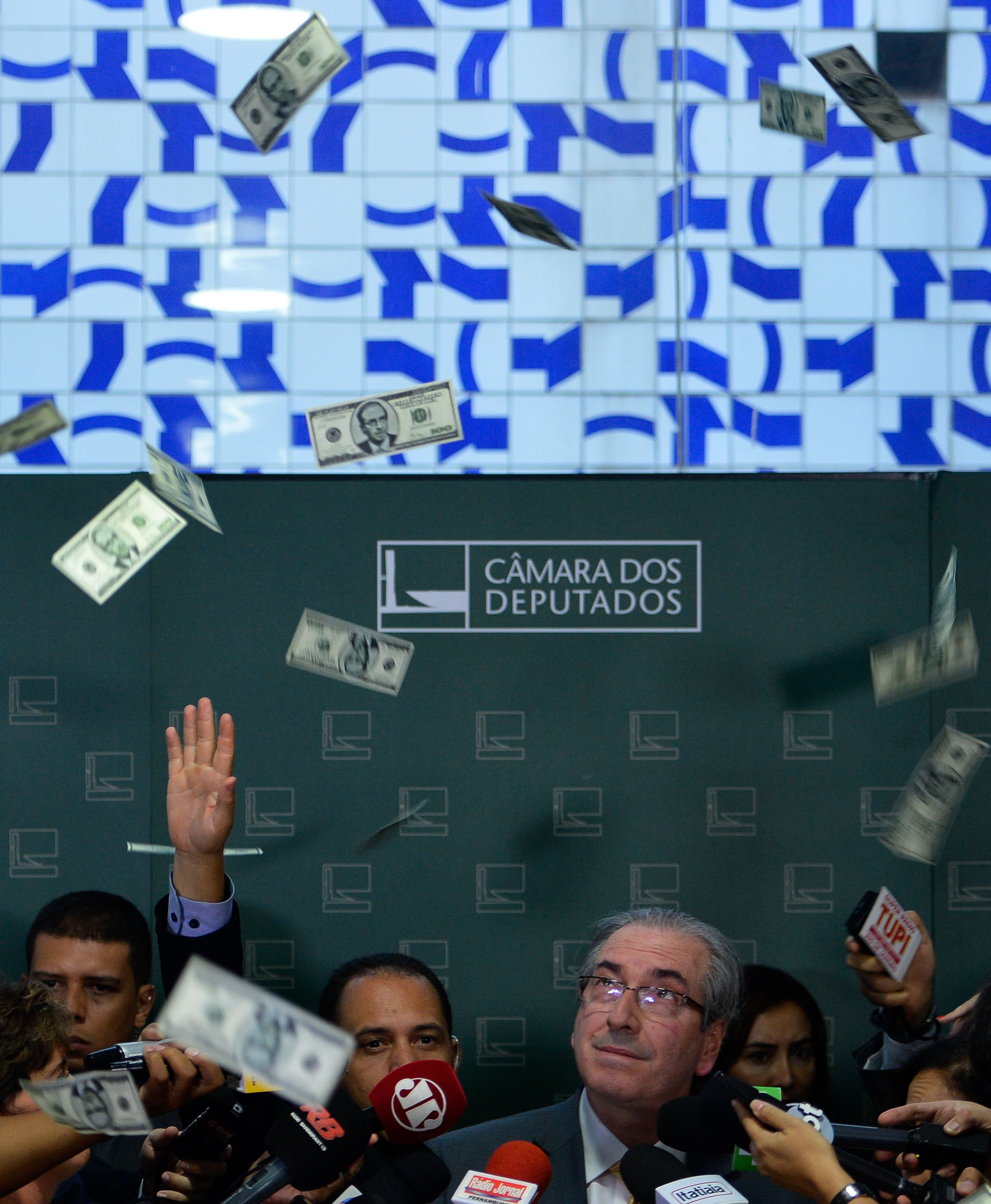 O presidente da Câmara dos Deputados, Eduardo Cunha, recebe uma "chuva de dólares."